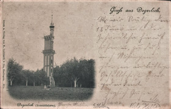 Degerlocher Aussichtsturm. Ansichtskarte